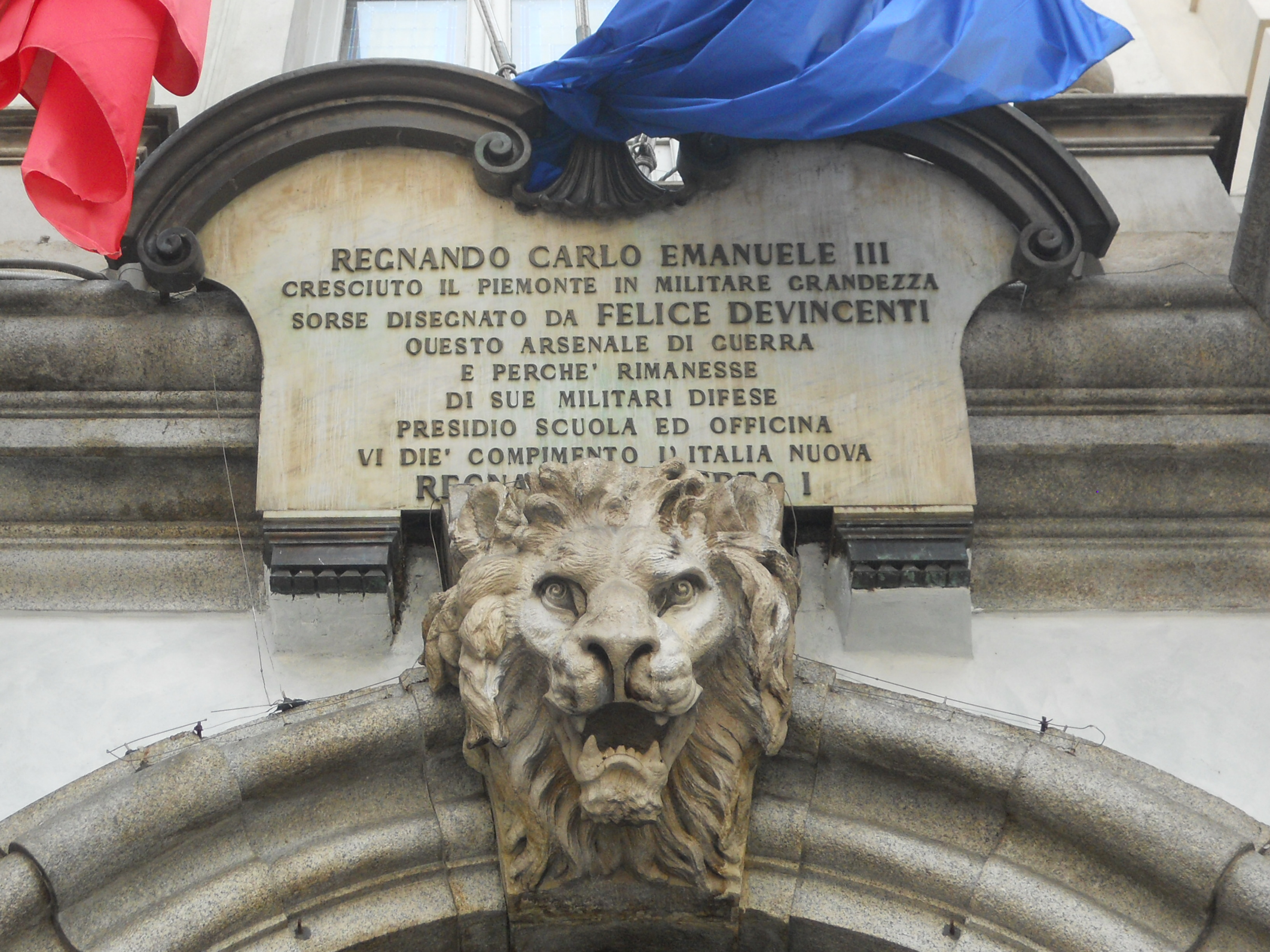 Leone e targa sul portone del Palazzo dell'Accademia in via Arsenale